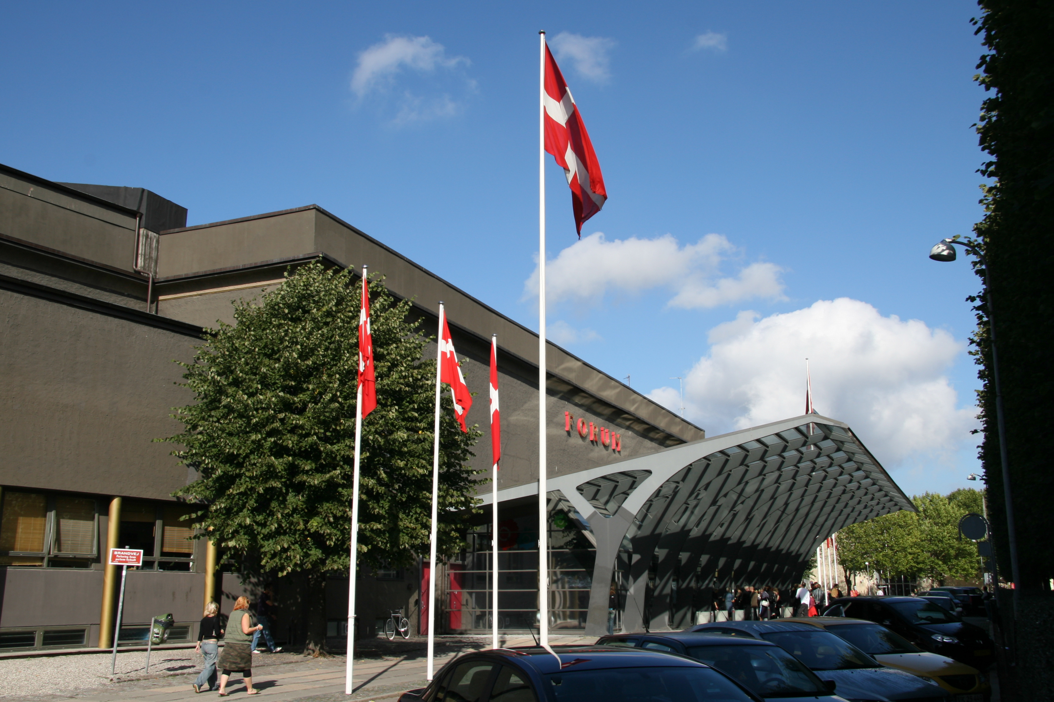 Forum Exhibition Building, Copenhagen, Denmark